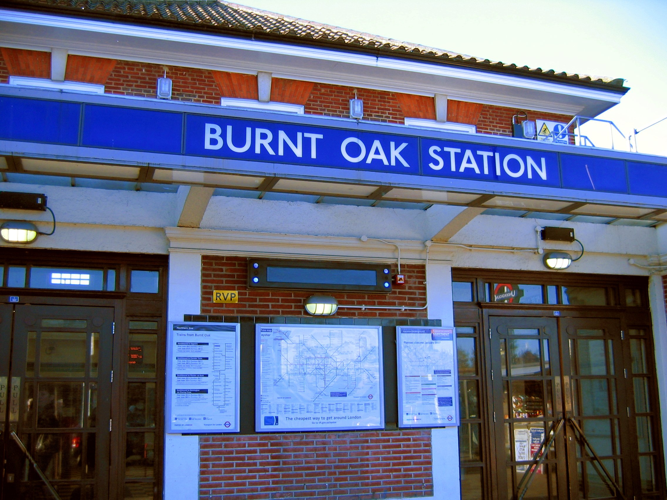 Burnt Oak tube station entrance, London.